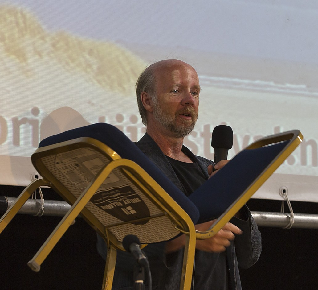 Marten Scheffer bij Springtij 2013. Dag 1 donderdag 26 sep